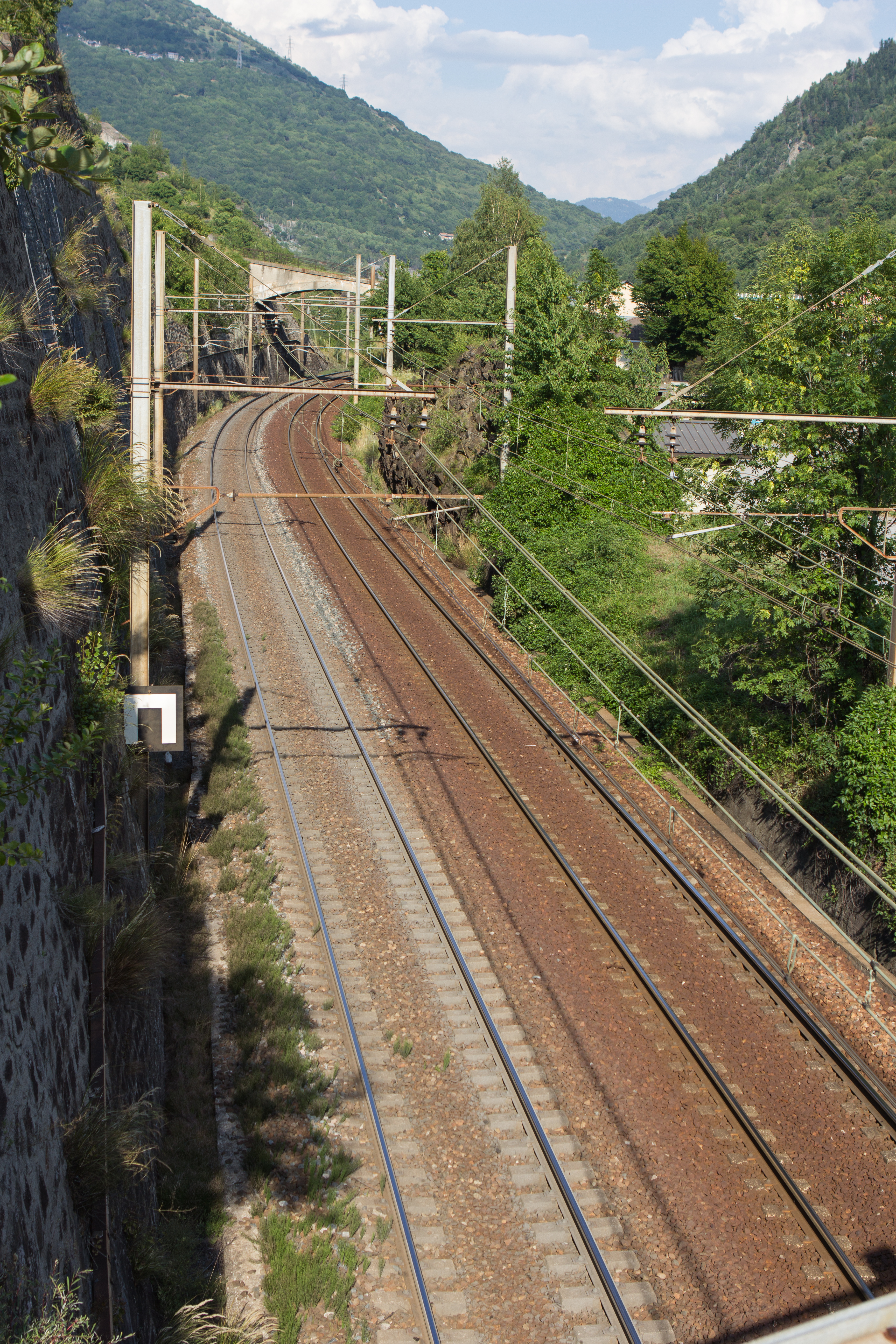 Lieu de l’accident ferroviaire de Saint-Michel-de-Maurienne du 12 décembre 1917 (vue en direction de Modane depuis le pont de la route C11), Saint-Michel-de-Maurienne (hameau de Saint-Anne), Savoie, France